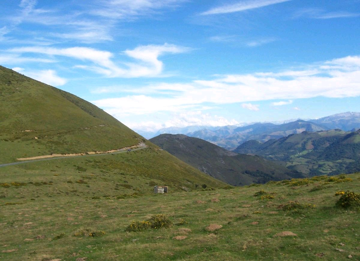 Col de Burdin Olatze dans les Arbailles, ce col est bien connu des chasseurs de palombes